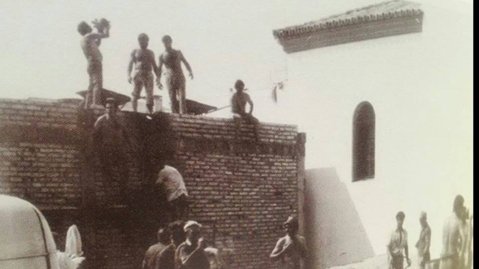 Construcción del Hogar del Pensionista.